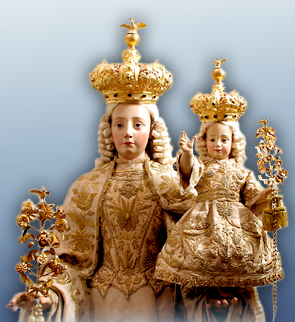 San Severo: la statua della Madonna del Rosario, opera di Giacomo Colombo (1716). Elaborazione di Tobia Gorrio (2006). Giacomo Colombo, statue of the Madonna del Rosario, (1716), Santissima Trinità dei Celestini church, San Severo